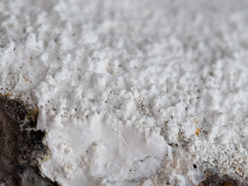 Huntita de la pedrera Asland, Montcada i Reixac, Vallès Occidental, Barcelona, Catalunya